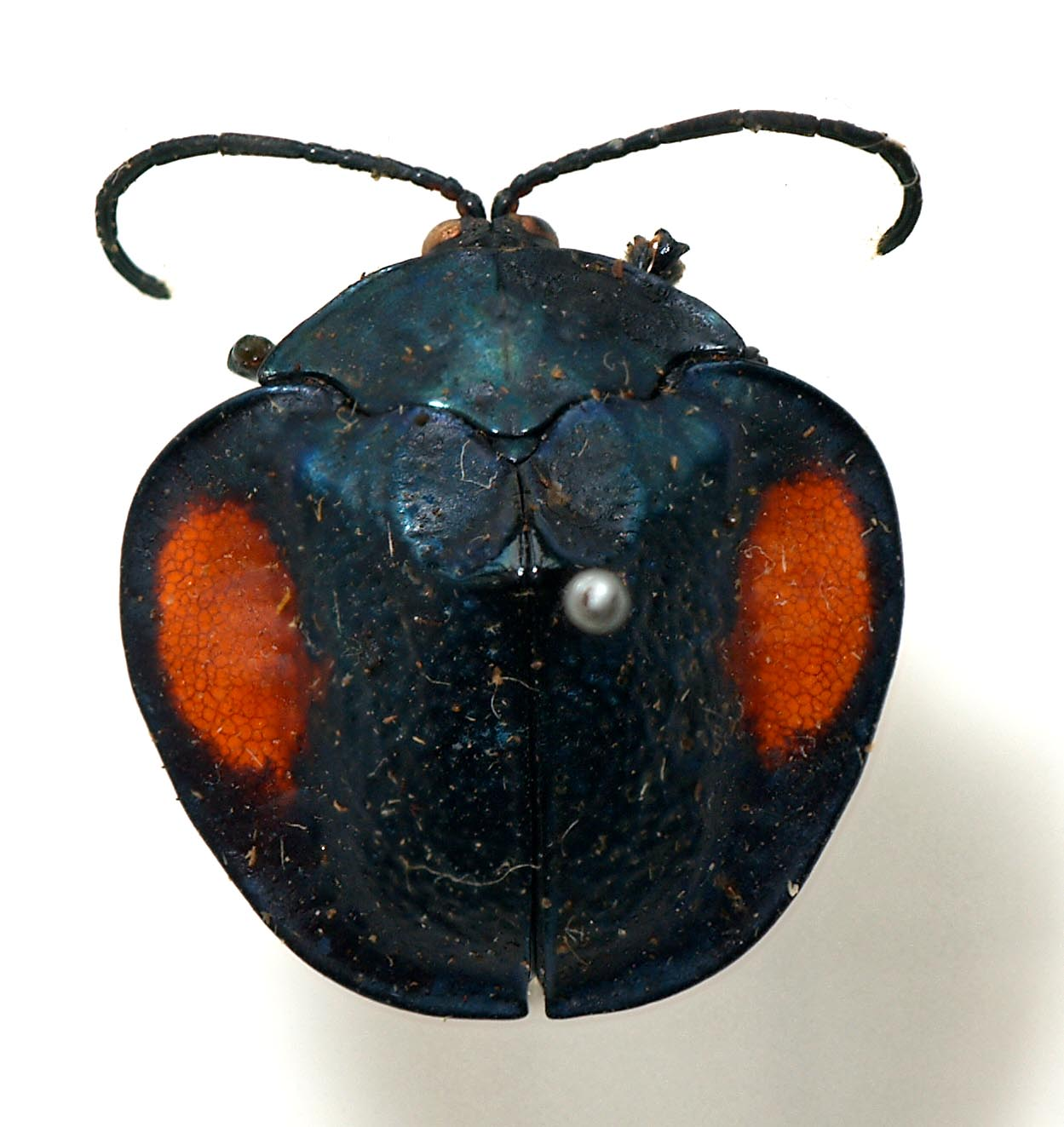 Oxynodera distincta